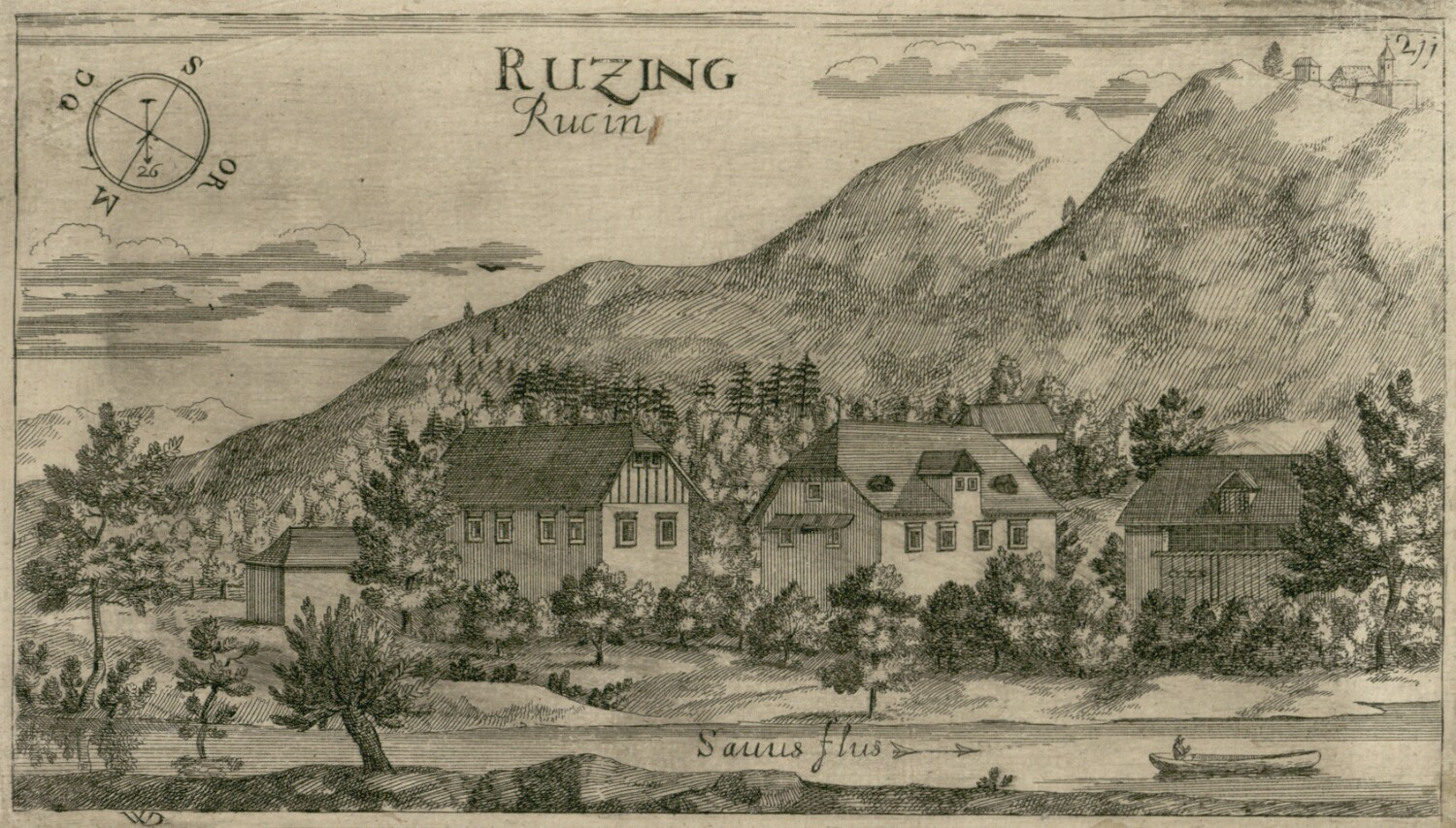 Dvorec Rocen